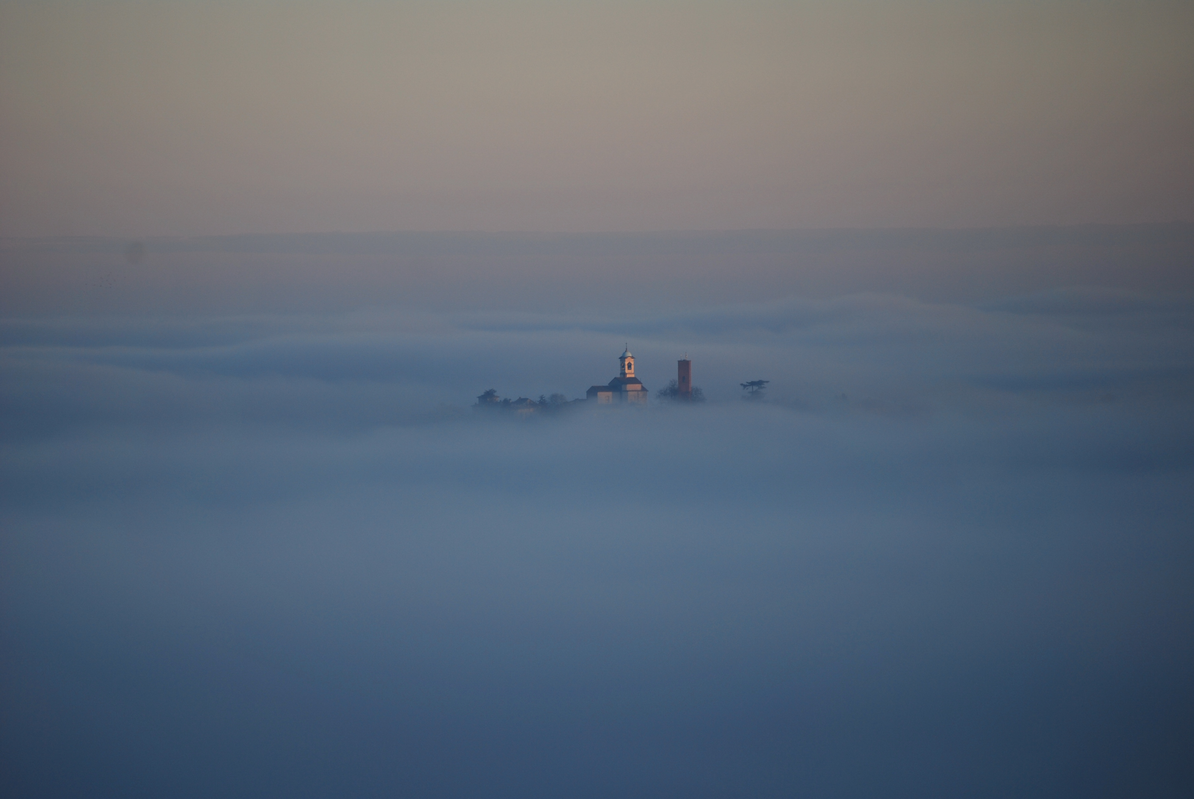 Paese di Zenevredo fotografato dalla Rocca Di Stradella